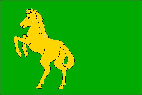 Vlajka obce Újezd u Černé Hory